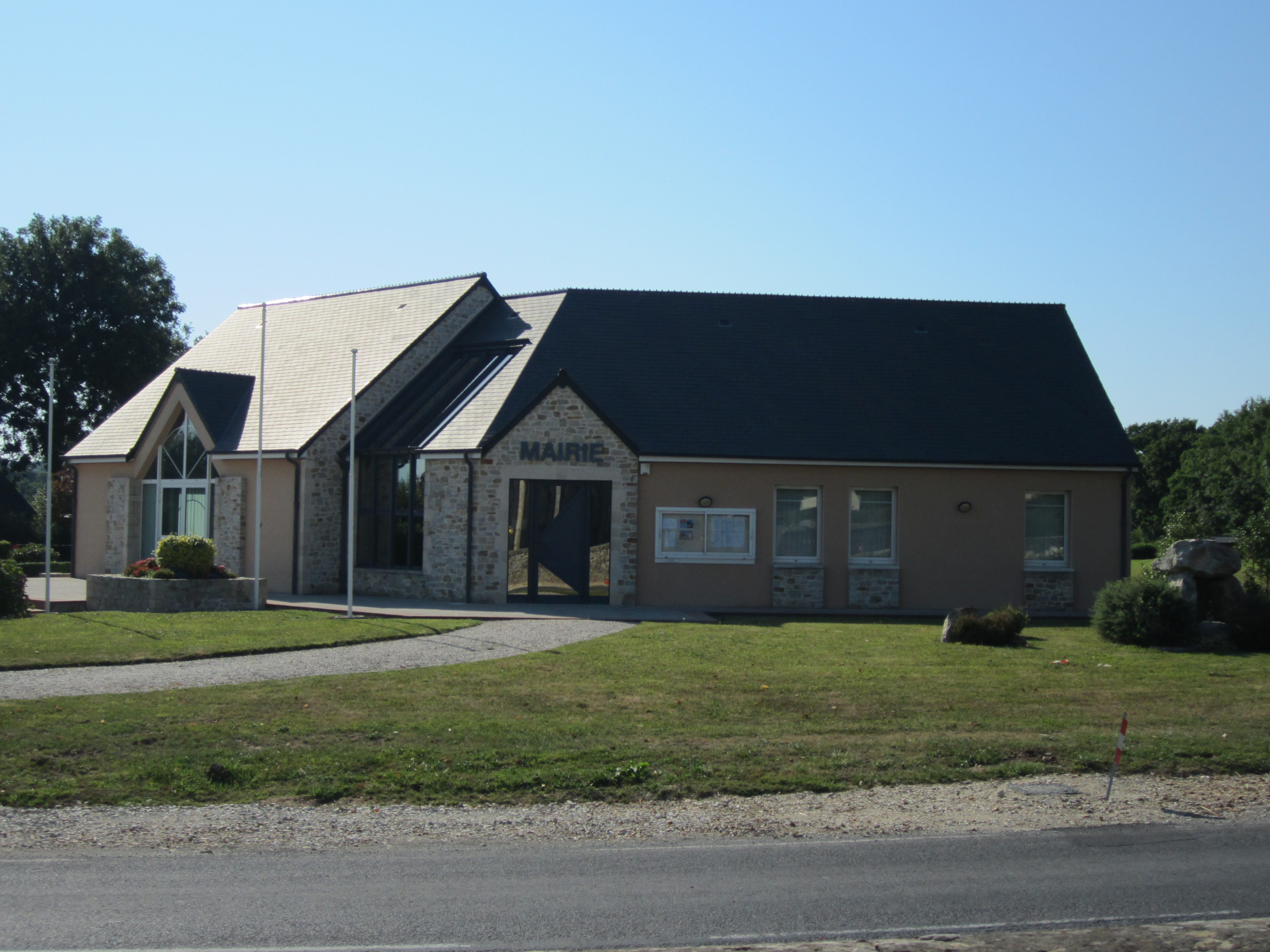 Rocheville, Manche